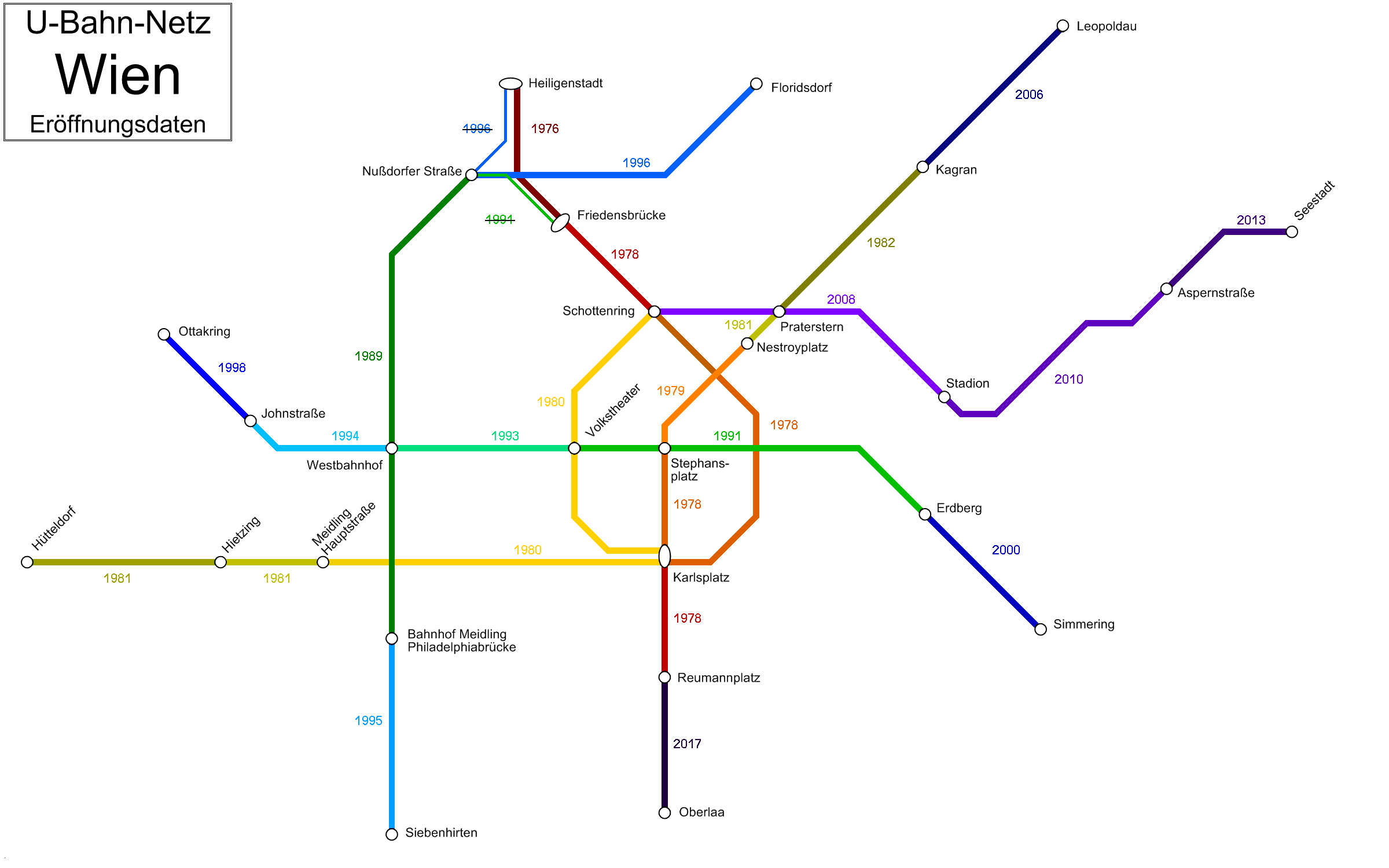 Eröffnungsdaten der Wiener U-Bahn